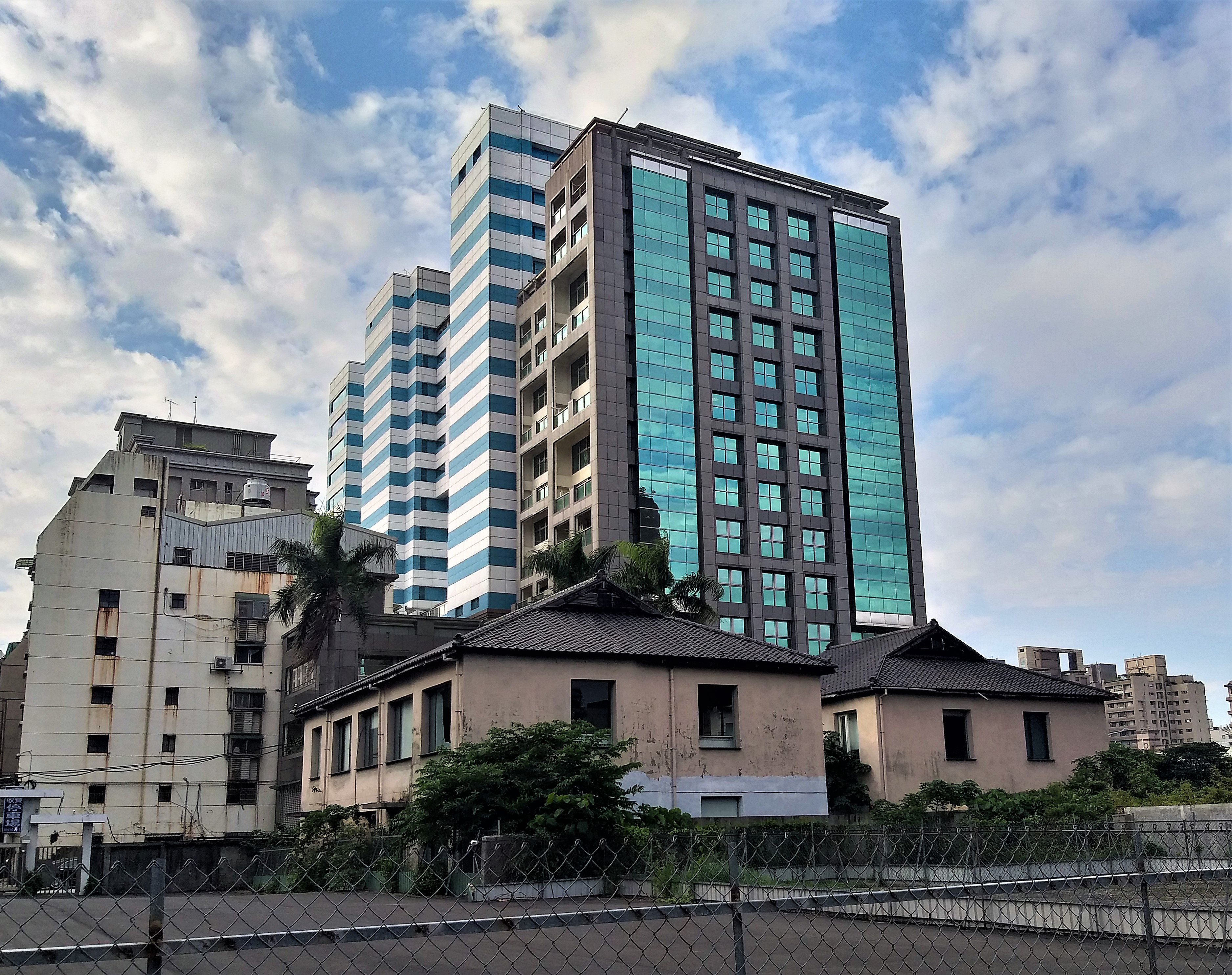 紹興北街31巷53號（糧食局倉庫）西面